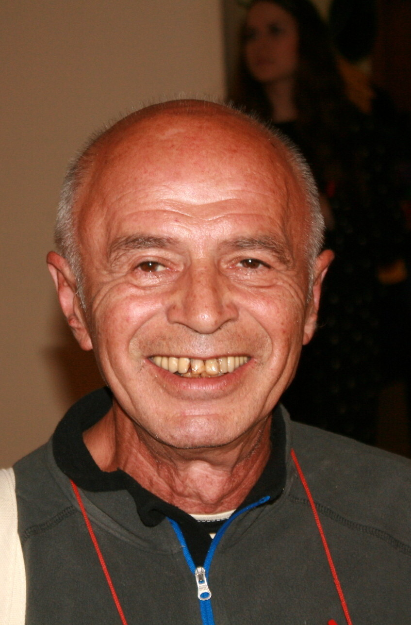 Игорь Бяльский